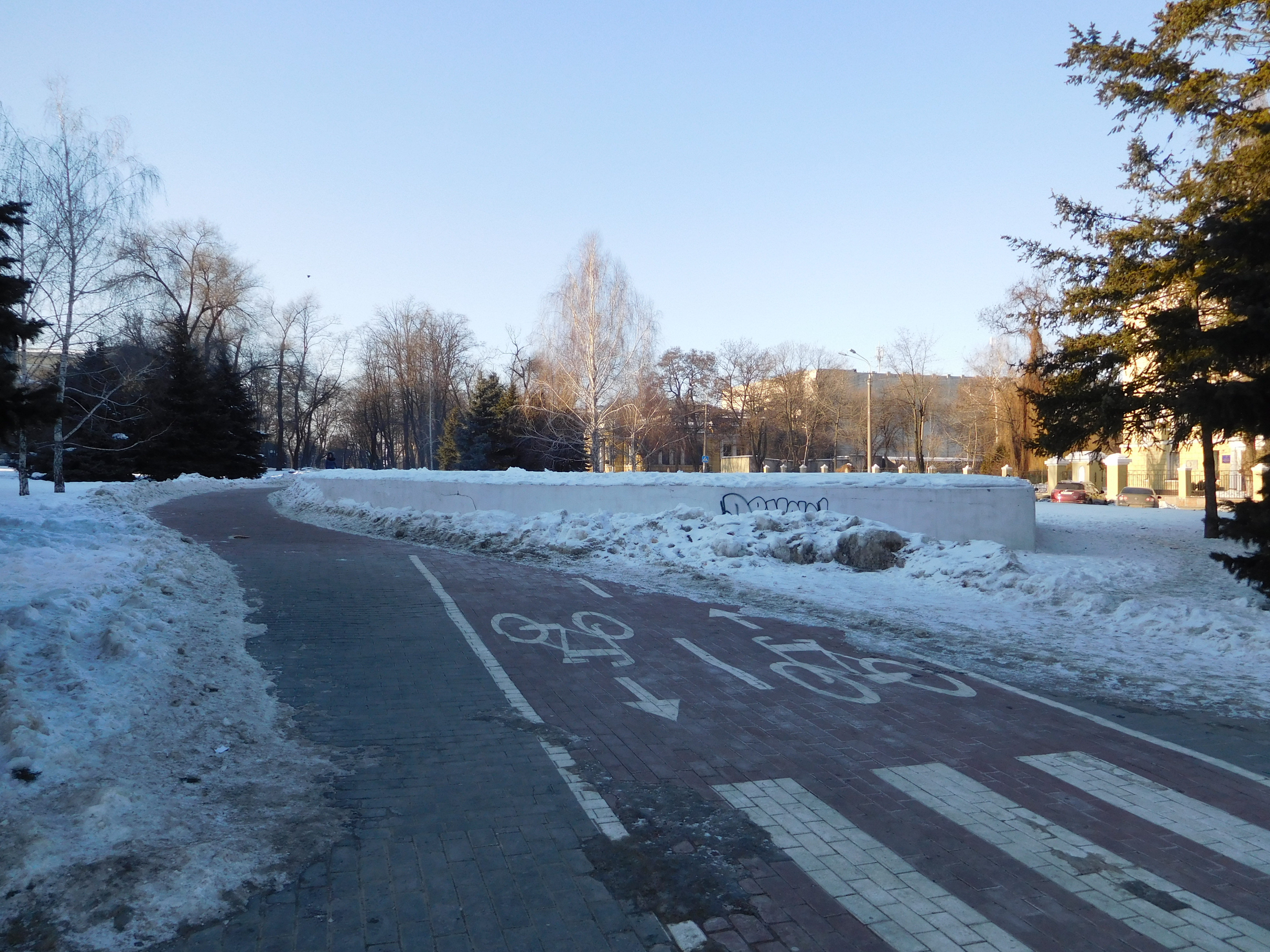 Место выхода будущей станции метро Музейная